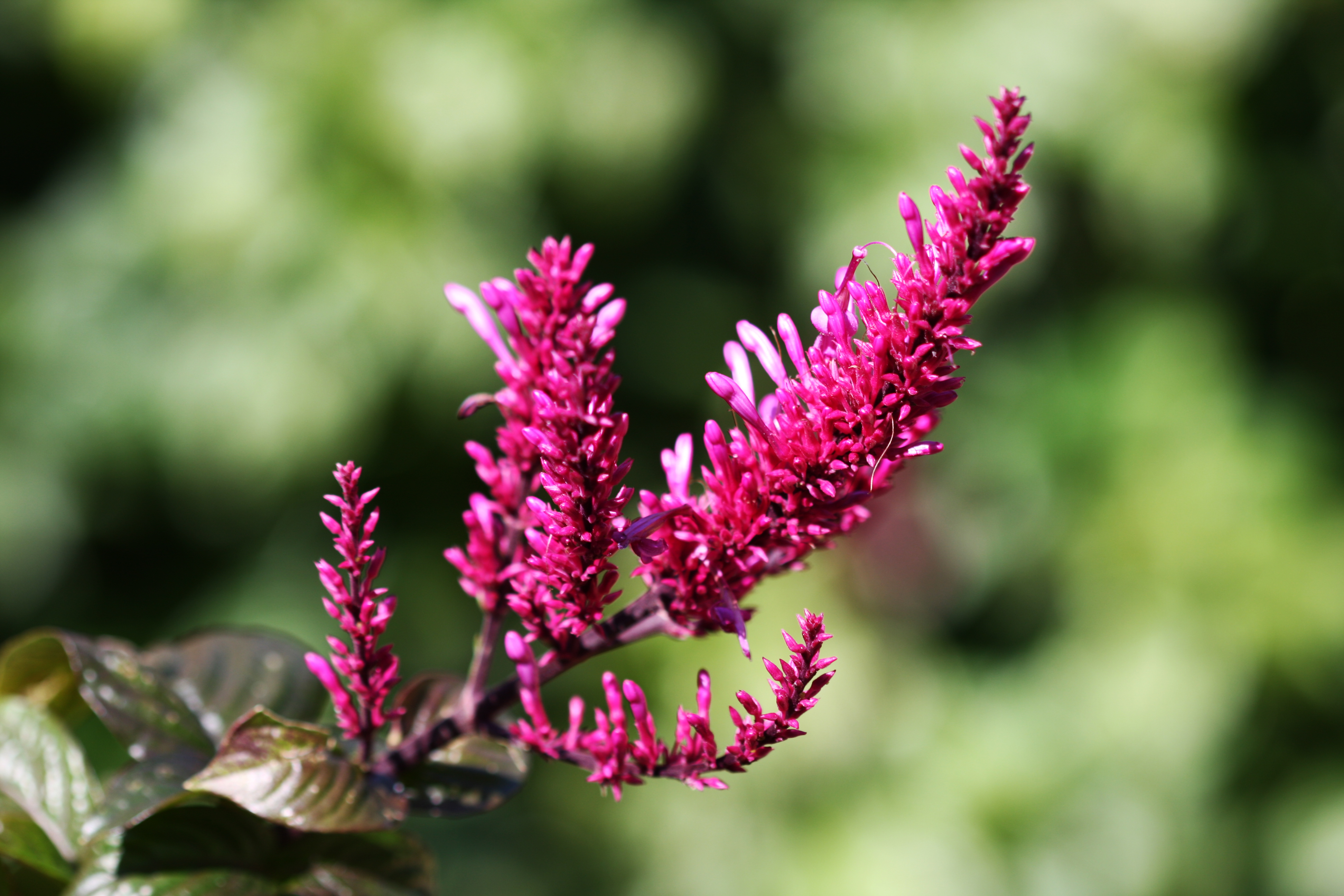 Odontonema Callistachys